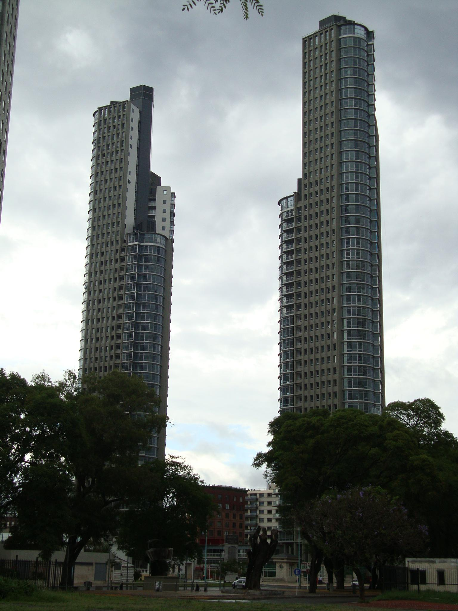 Las Torres Mulieris, vistas desde la esquina del Bv. Azucena Villaflor y la Av. Costanera. Puerto Madero, ciudad de Buenos Aires, Argentina.